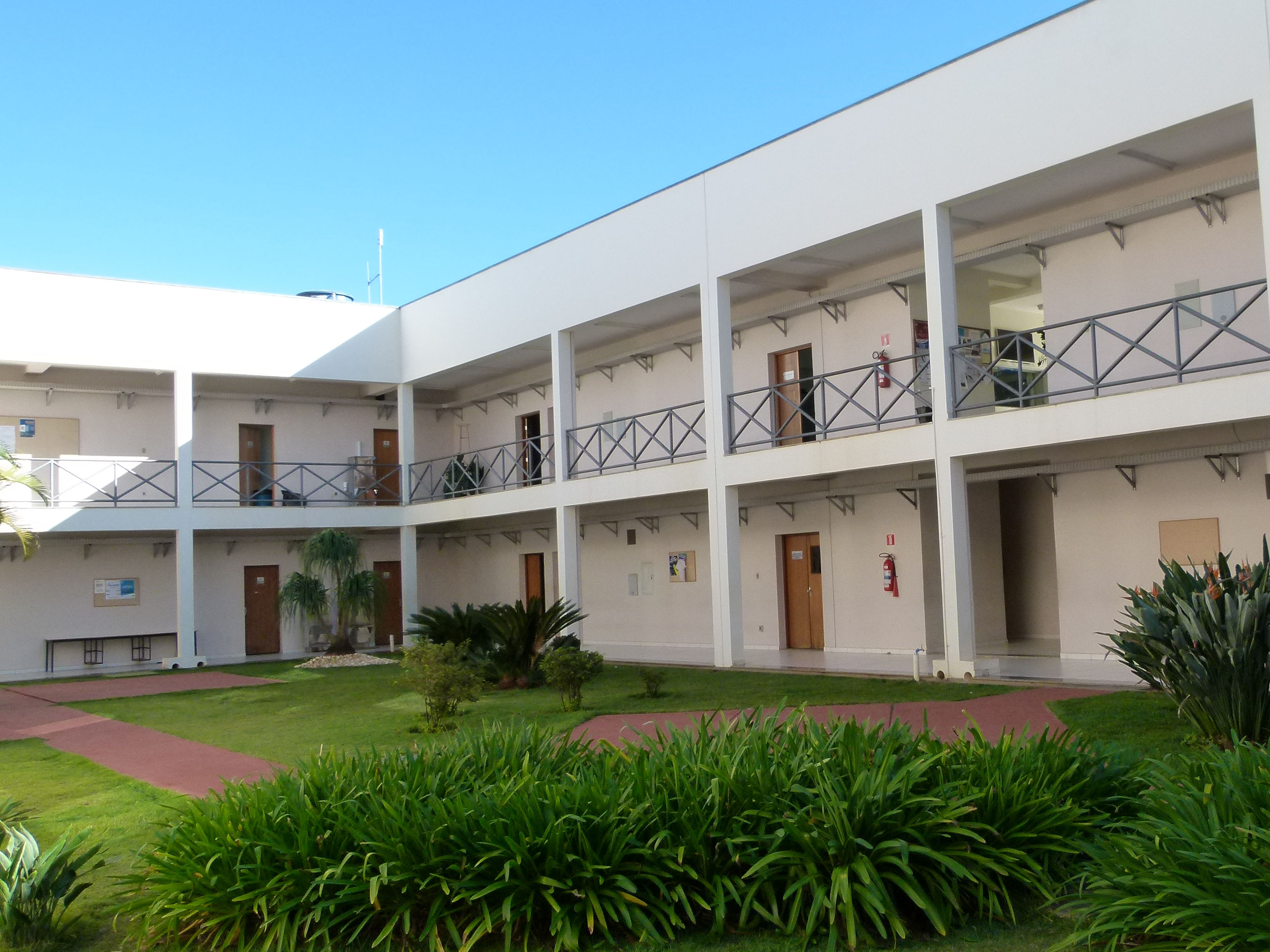 Departamento de Ciência da Computação